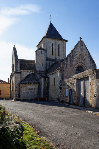 Église Saint-Jean-Baptiste de Marnes .